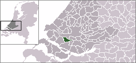 Locatie gemeente Spijkenisse. Afbeelding gemaakt door gebruiker:Mtcv en vrij te gebruiken.